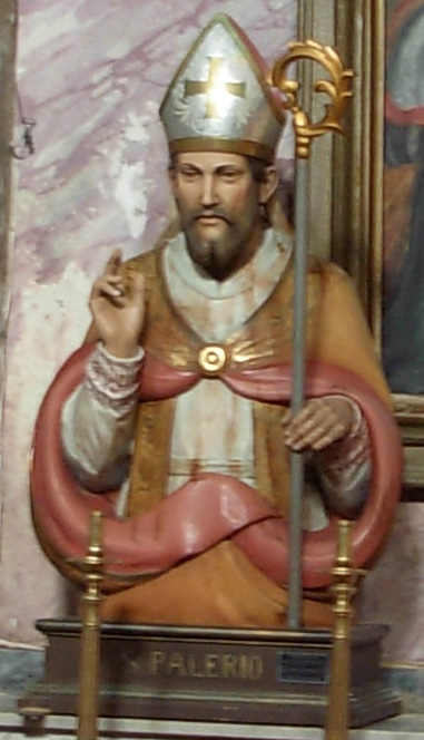 Statua di San Palerio all'interno della chiesa di San Giovanni Battista a San Martino Valle Caudina (AV)